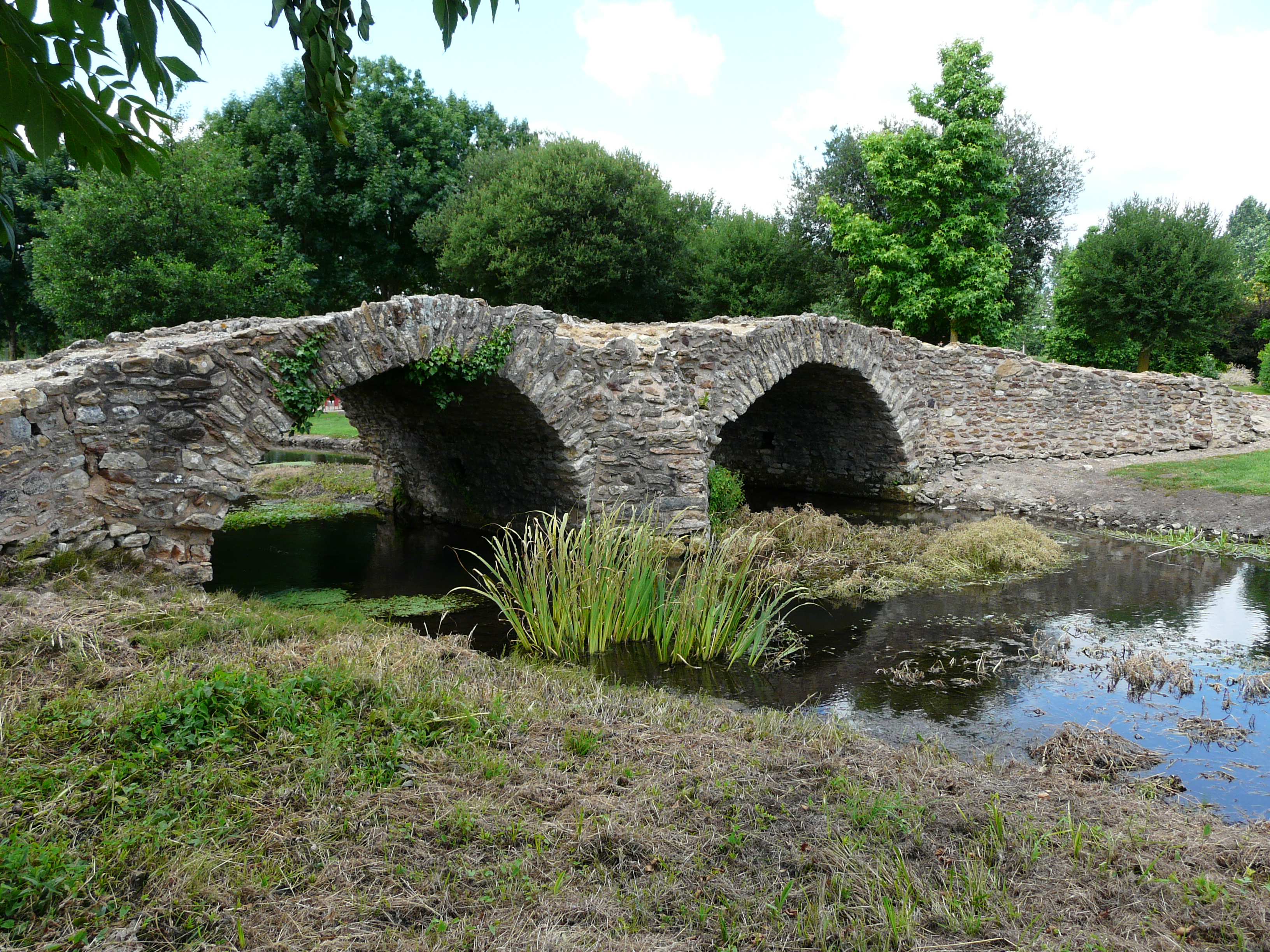 Le pont de la Reine Blanche sur la Dive, Curçay-sur-Dive, Vienne, France